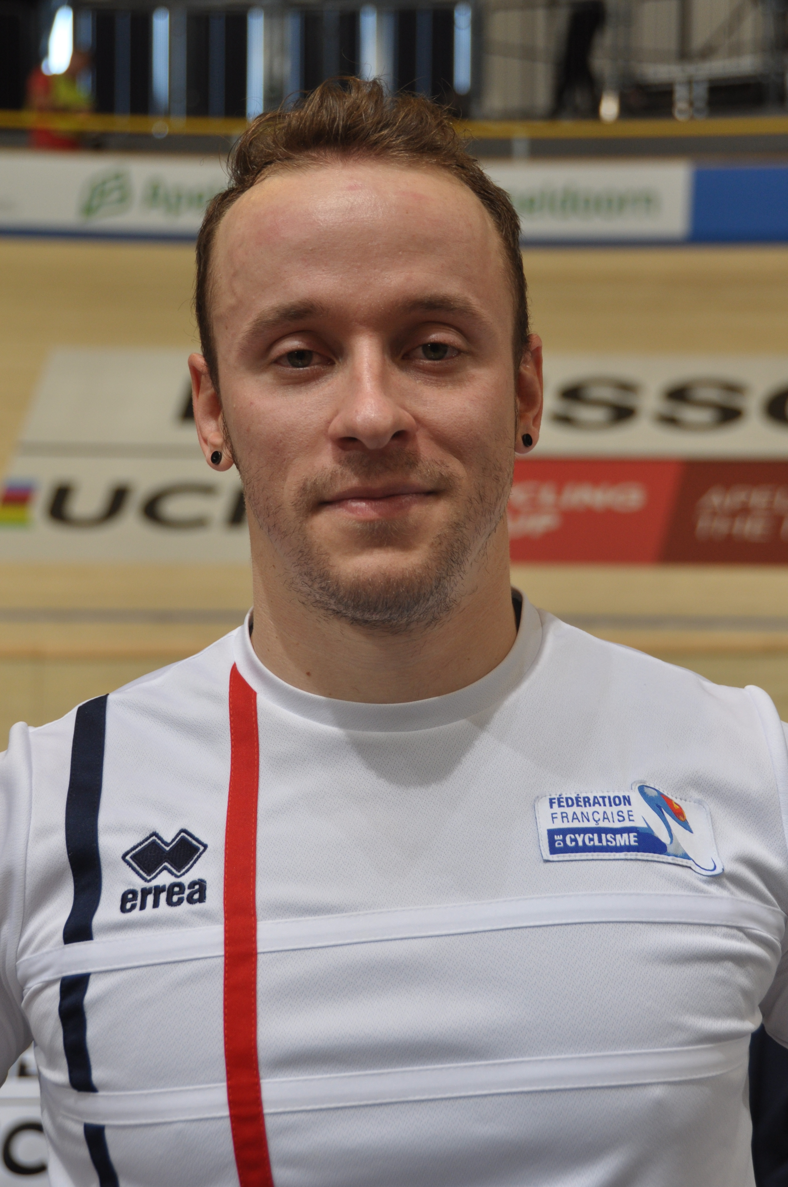 Charly Conord, französischer Radsportler